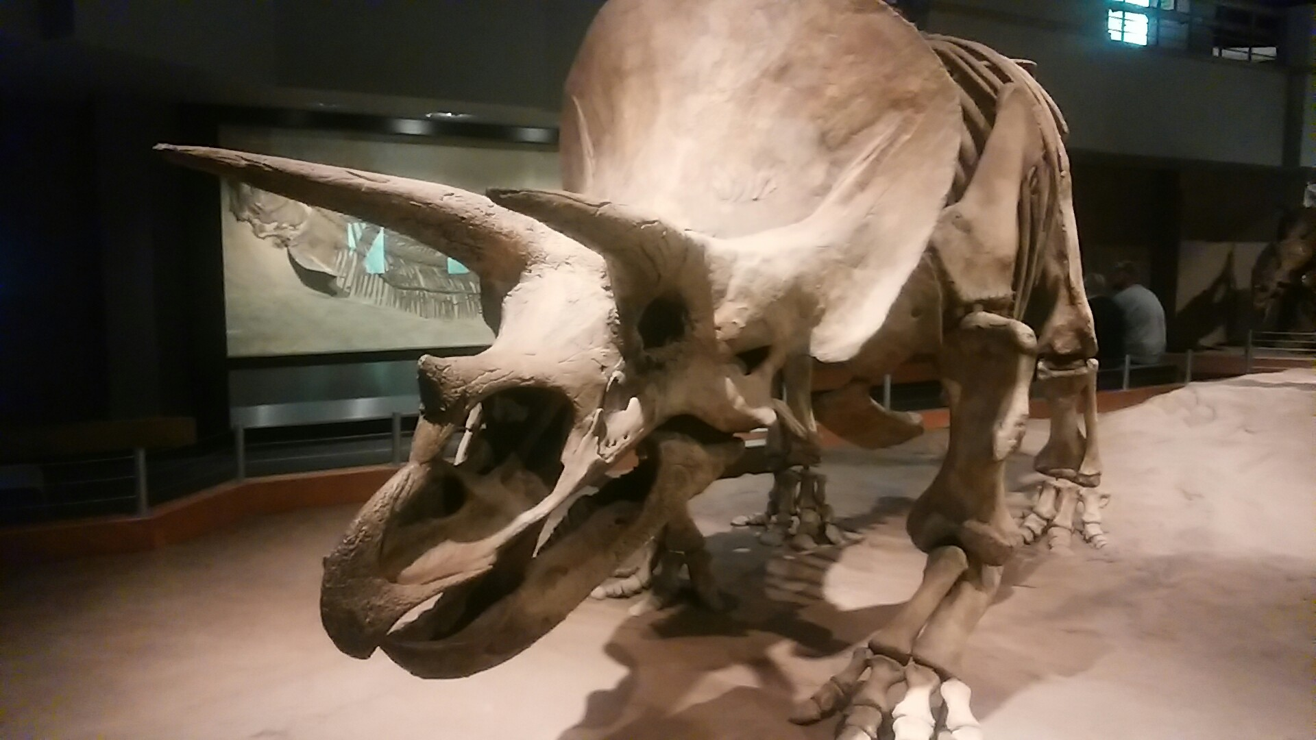 トリケラトプス・ホリドゥス。ロイヤルティレル古生物学博物館蔵。